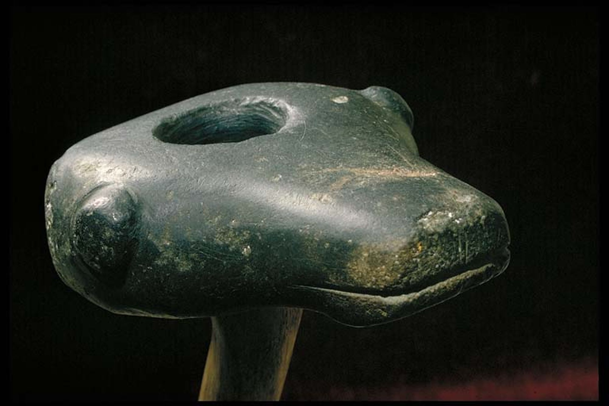 Djurhuvudklubba av grönsten, längd 15 cm, 3999 f.Kr. - 1700 f.Kr. i Stora Vika, Yngre stenålder.